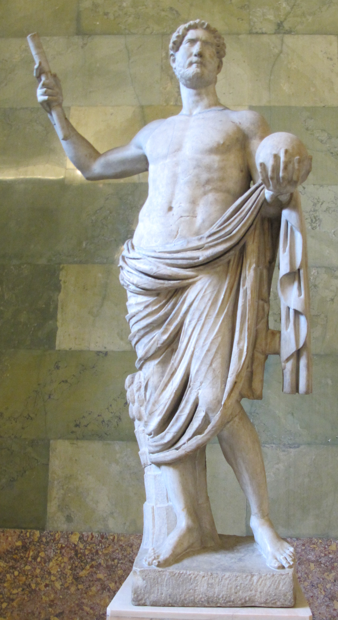 Statua di adriano, 117-138